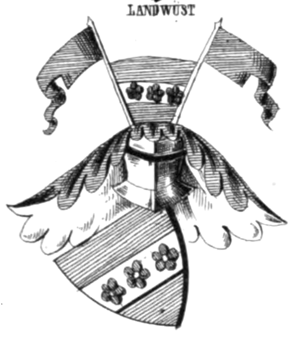 Adeliges Wappen von Landwüst